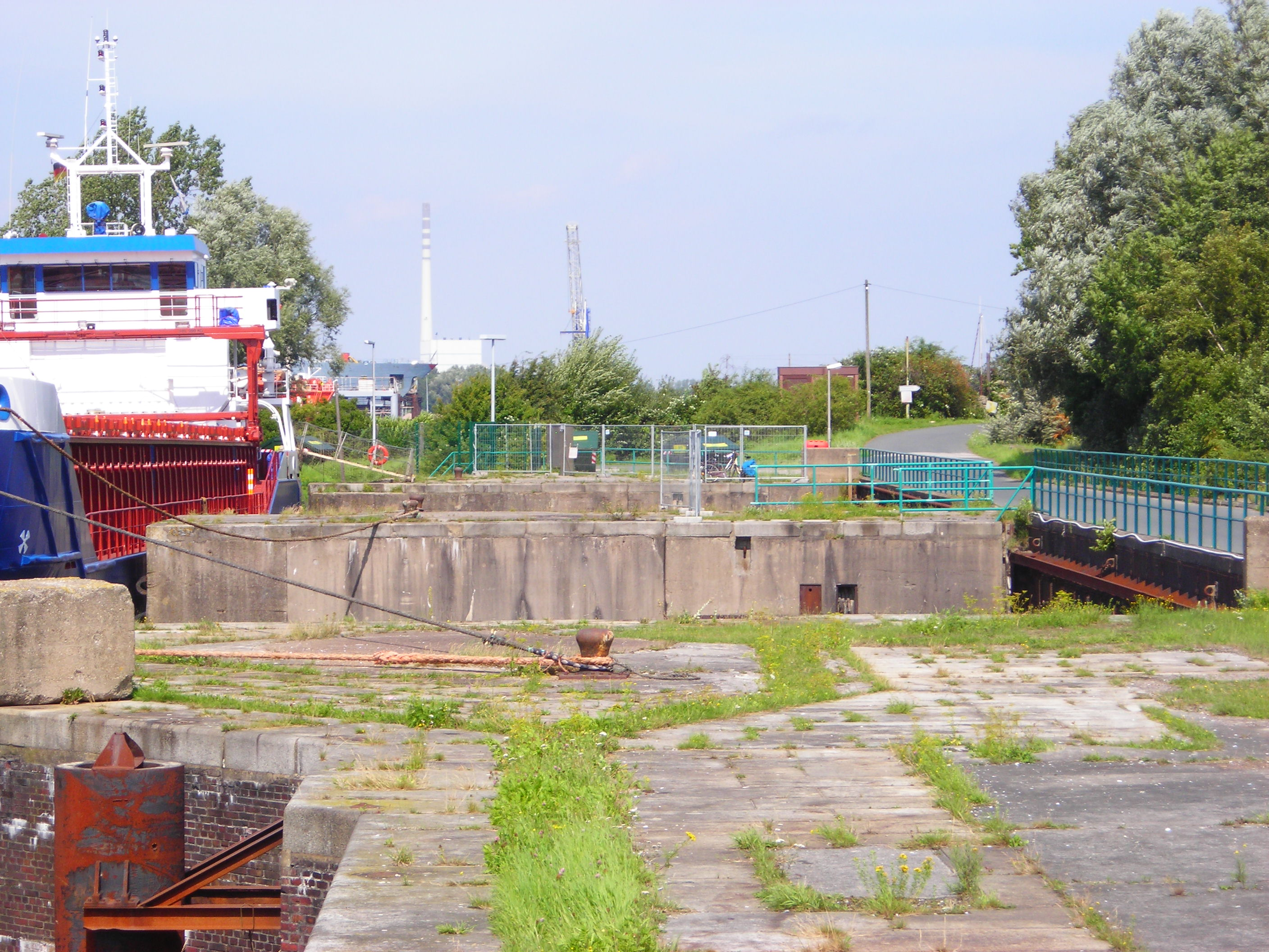 Die Innenseite der ehemaligen Dritten Einfahrt der Wilhelmshavener Häfen. Zu erkennen sind die beiden dichtgesetzten Schleuseneinfahrten.